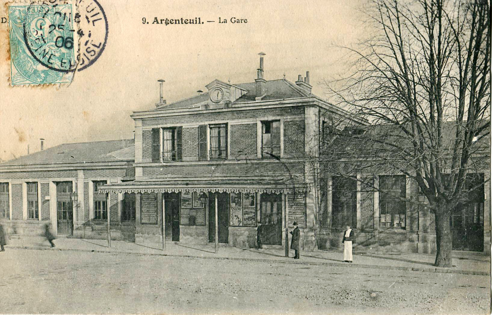 Carte postale ancienne, avec une mention d'éditeur masquée par le timbre, n°9 : ARGENTEUIL - La Gare